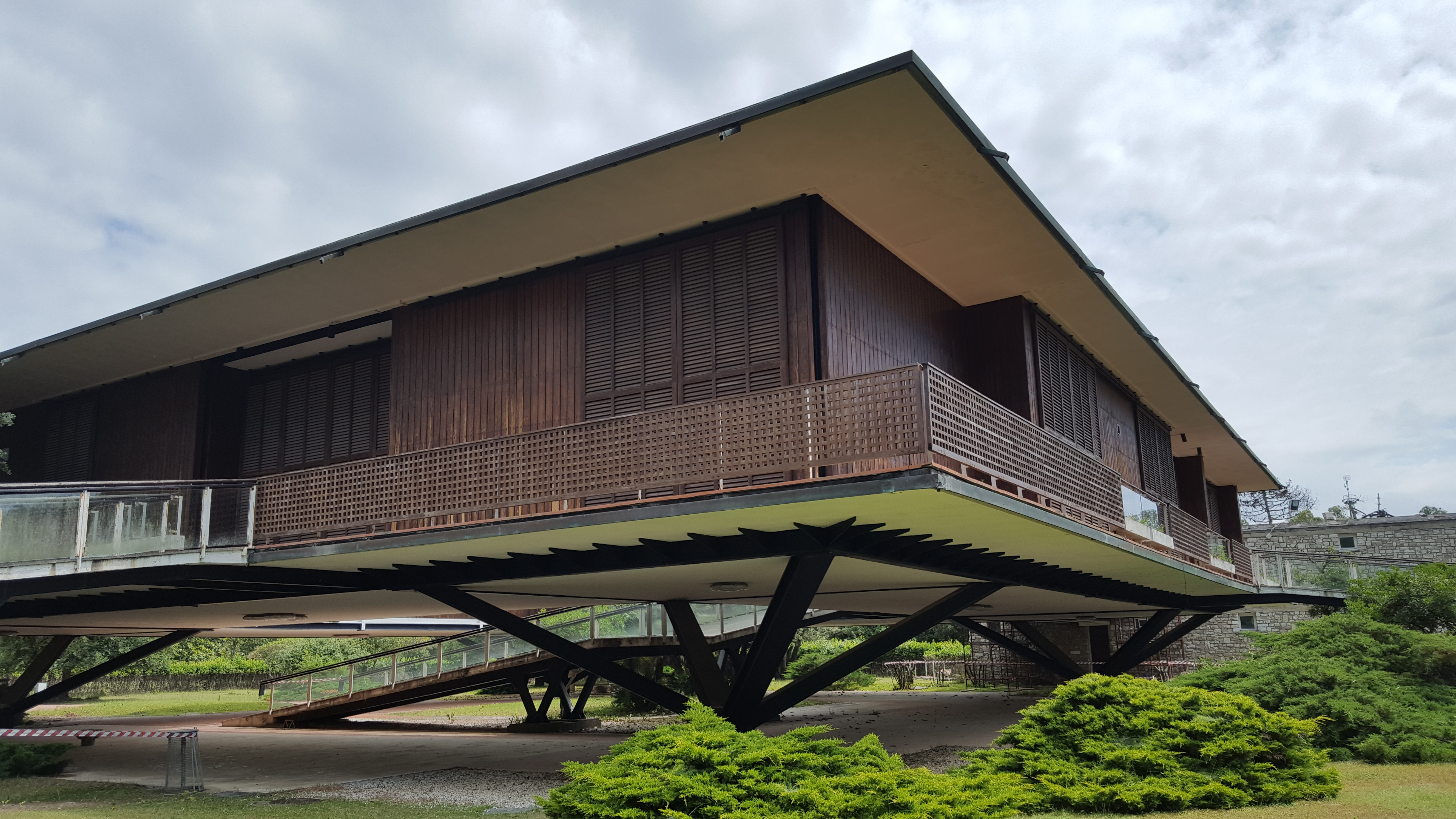 Parco naturale di Migliarino, San Rossore, Massaciuccoli (Q427946)